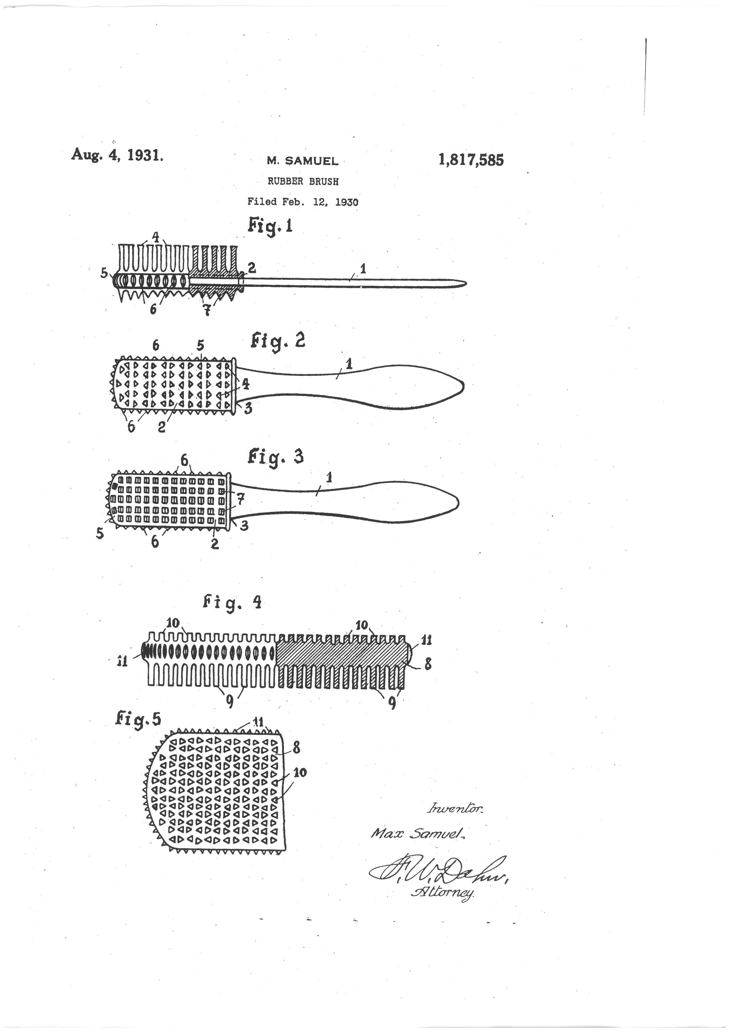 Max Samuels Wildlederbürste, seine Erfindung in Skizzen der Patentschrift, 1931